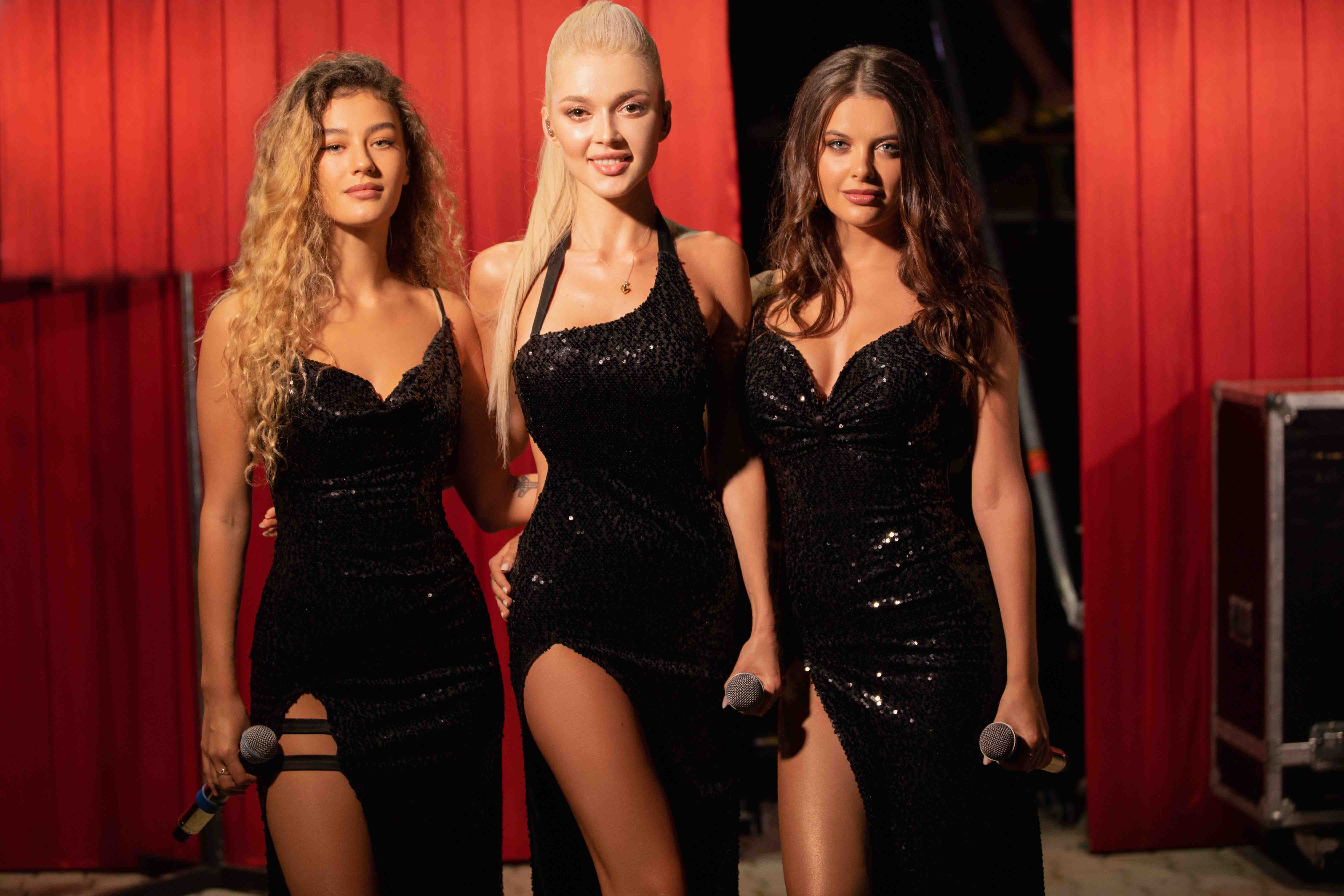 Группа «ВИА Гра» на концерте «Лайма Рандеву»